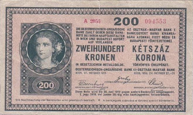 200 Austro-Hungarian Krone/korona (1918) - obverse